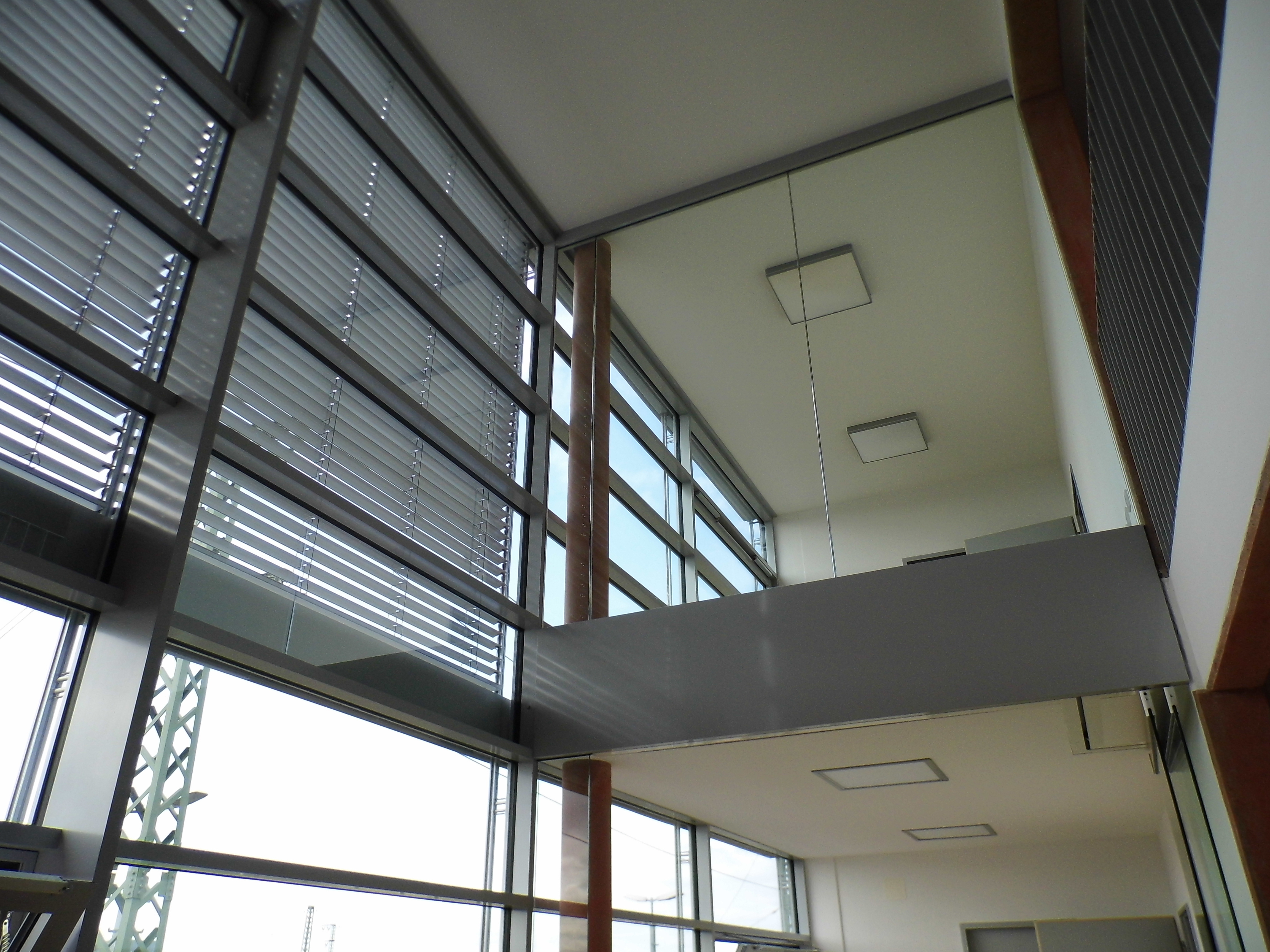 Blick in die Politische Akademie. Architektur & Interior Design: Wolfgang Rost, Dipl.-Ing.